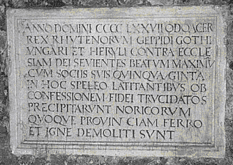 Мраморная плита, сохранившаяся в катакомбах «монашеской Горы» при костеле Святого Петра города Ювавум (ныне Зальцбург). Содержит текст, в котором Одоакр называется «королем рутенов»